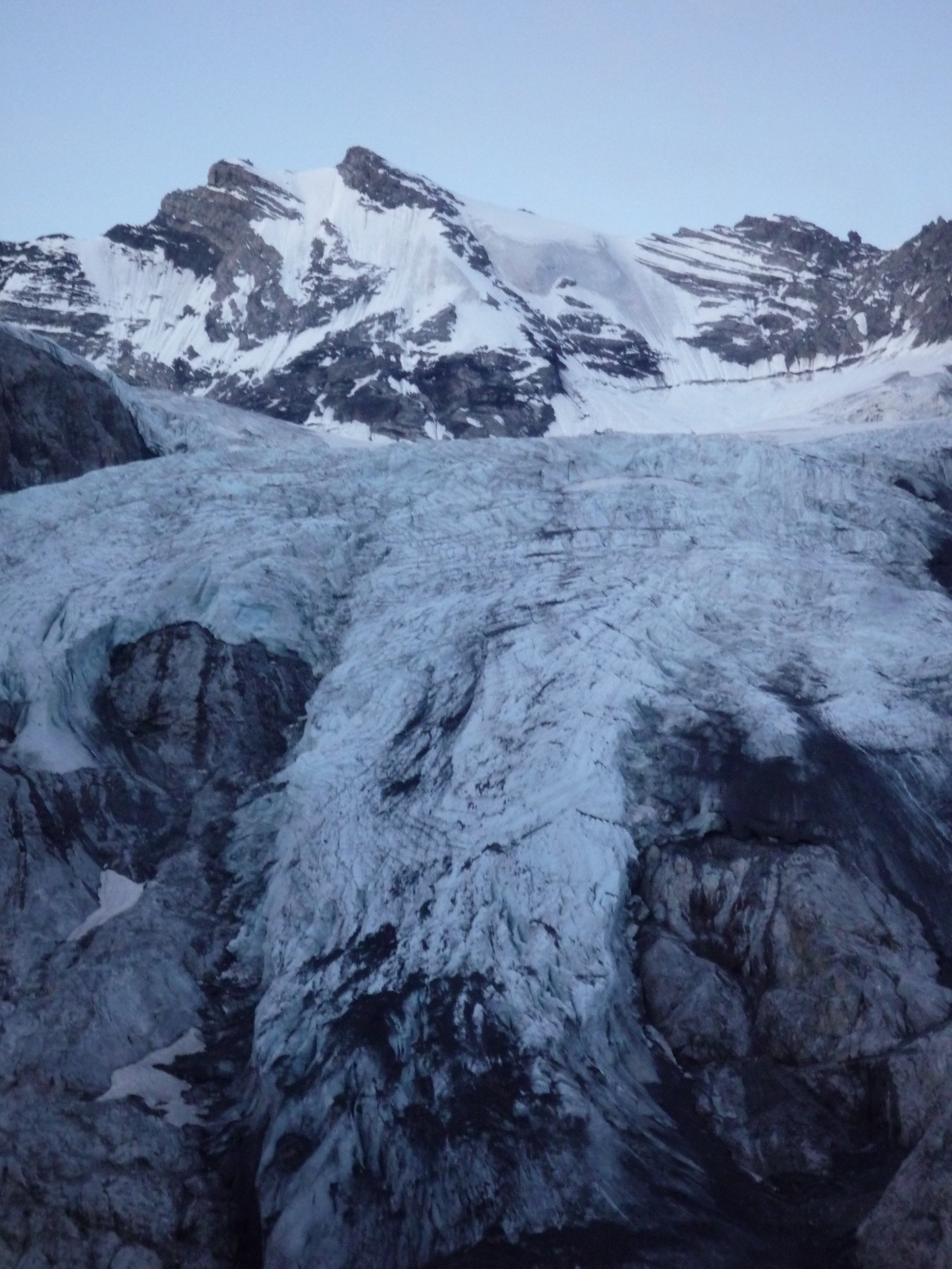 Trafoier Eiswand mit Zirkusferner; Tour ab Berglhütte